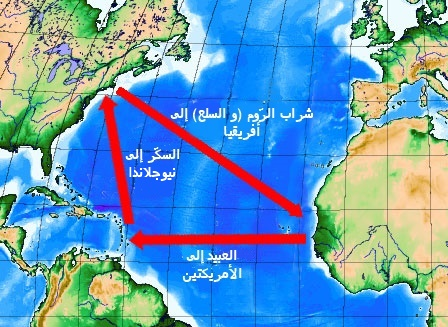 تصوير التجارة المثلثية من العبيد وسكر الروم مع نيو انغلاند بدلا من أوروبا الزاوية الثالثة